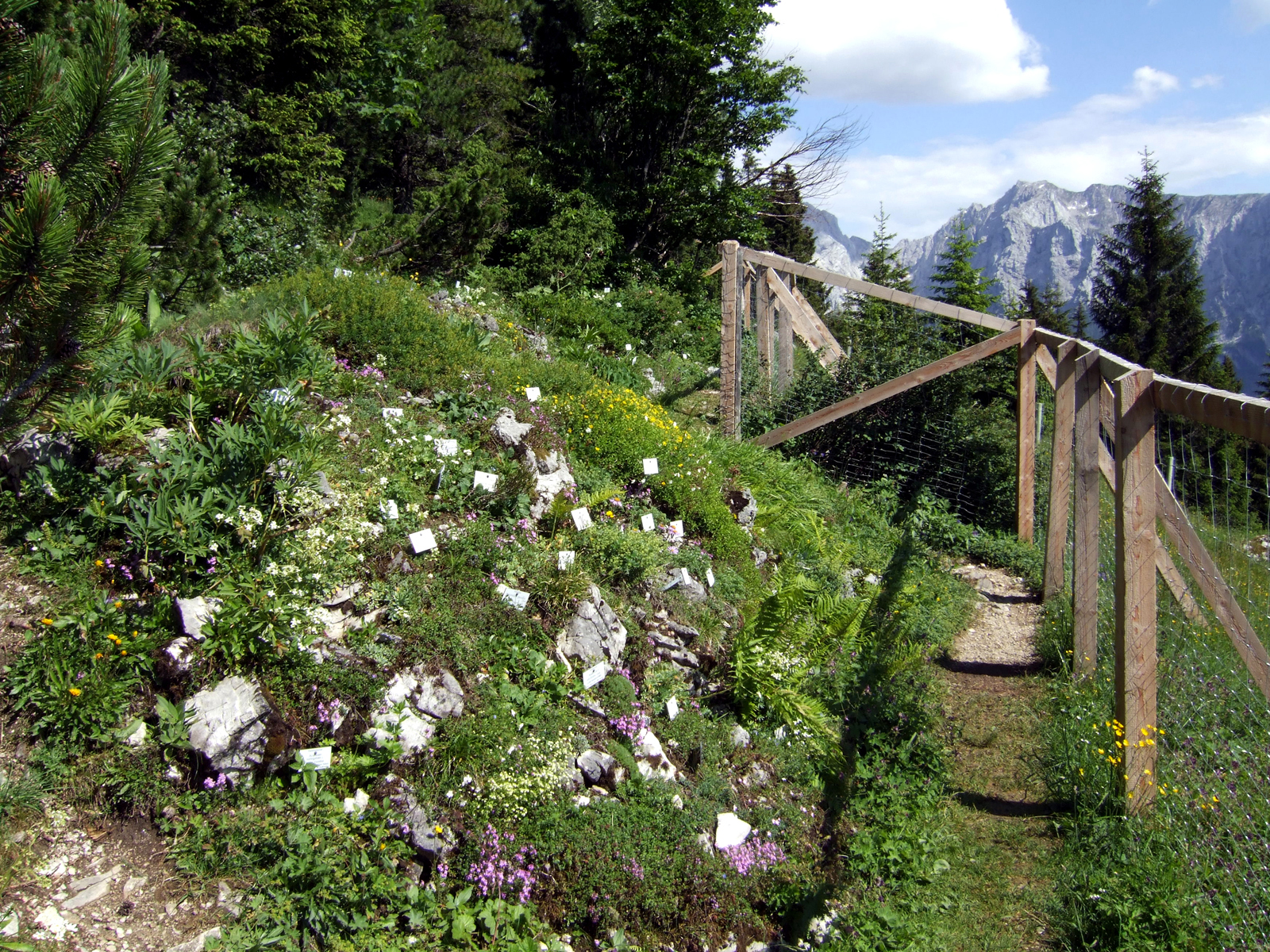 Beschreibung kommt später